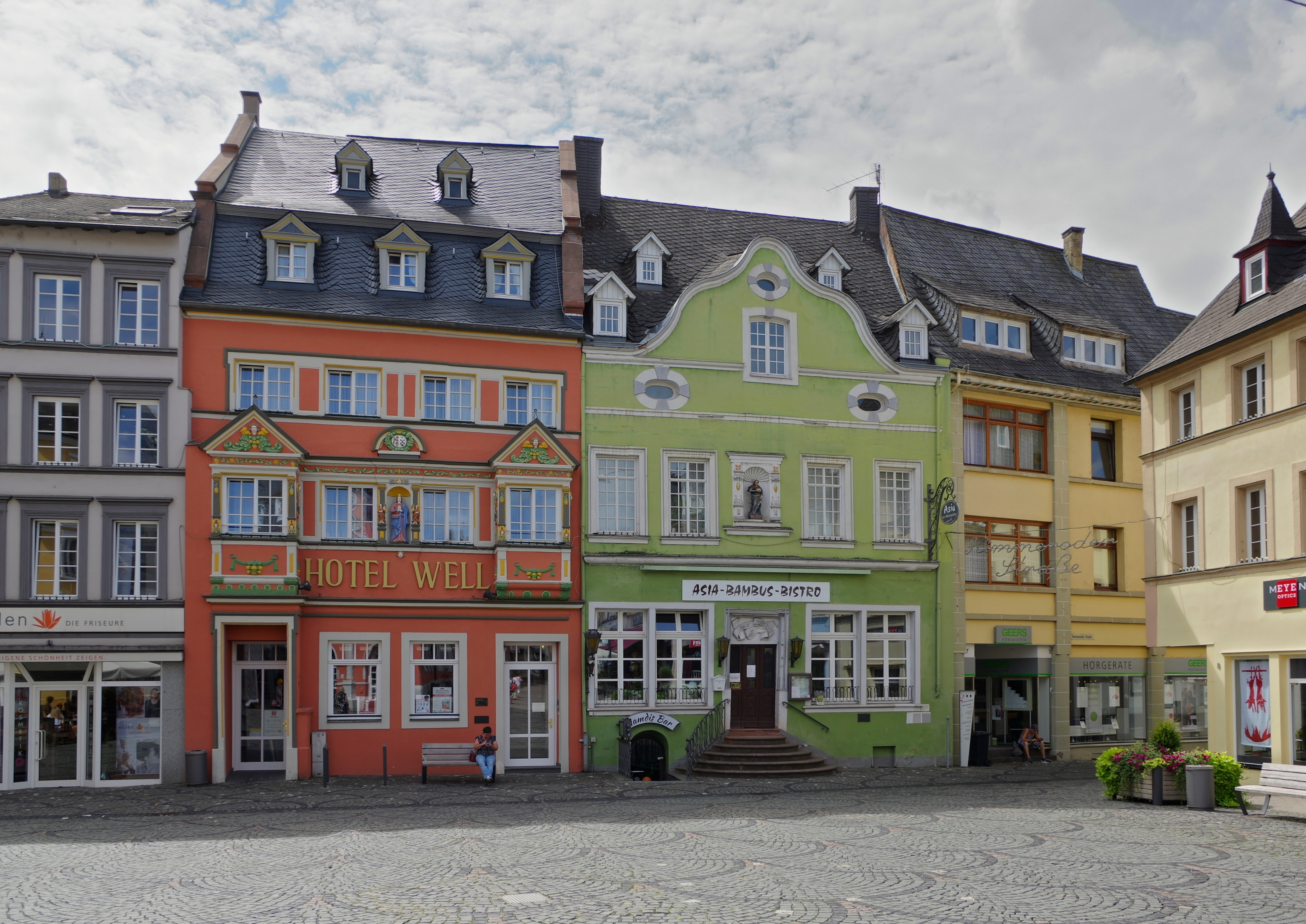 Wittlich, Denkmalzone Marktplatz, Blickrichtung nach Westen